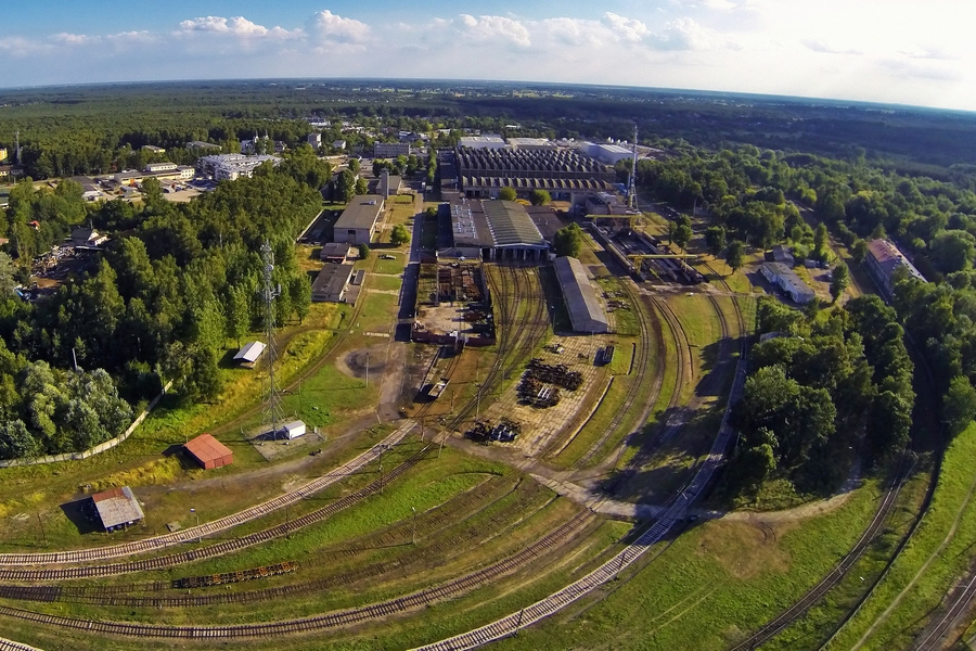 Teren ZNTK Mińsk Mazowiecki widziany z lotu ptaka.